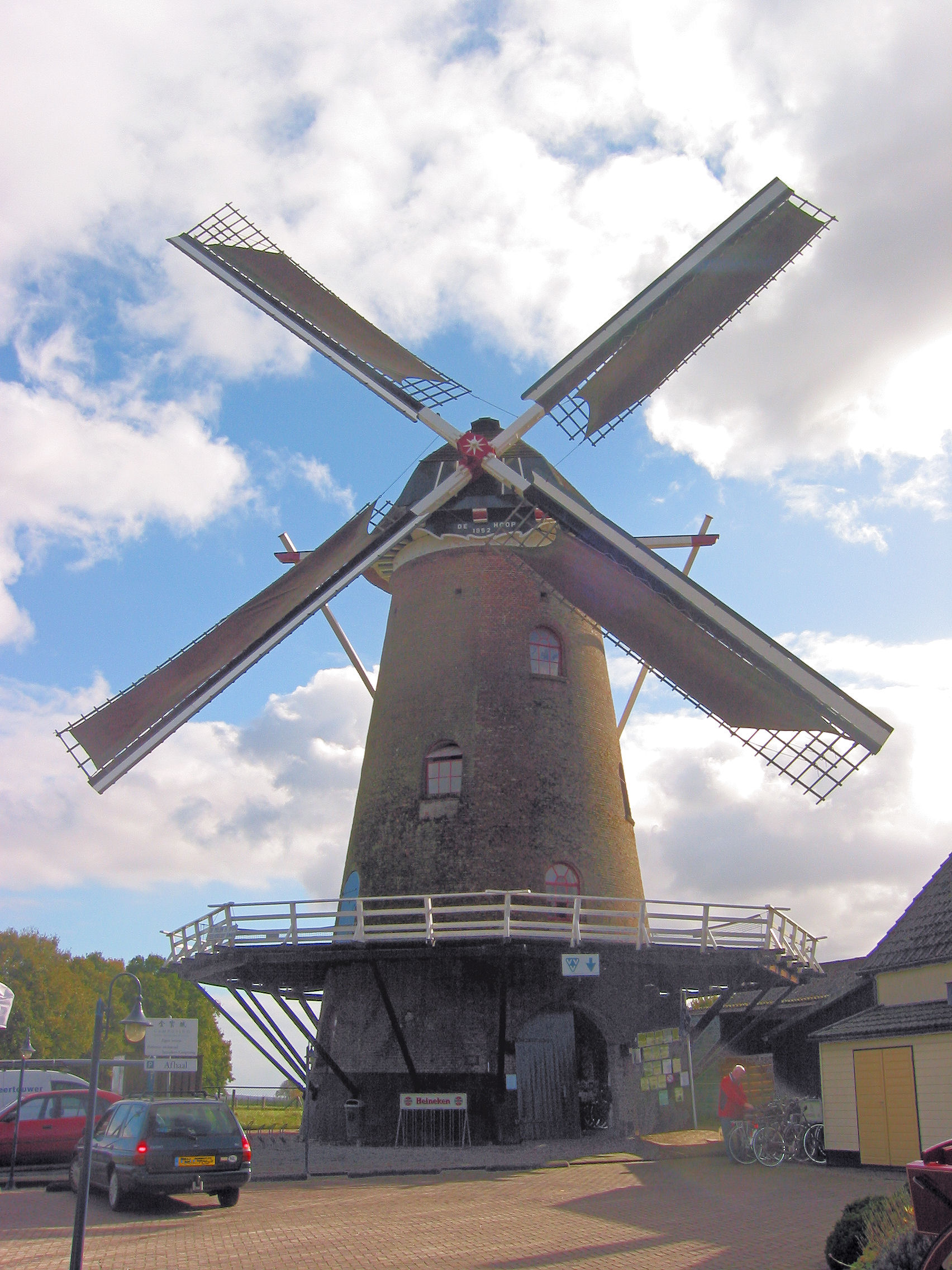 De Hoop in Garderen, 2 duikers en 2 volle, Gelderland, the Netherlands